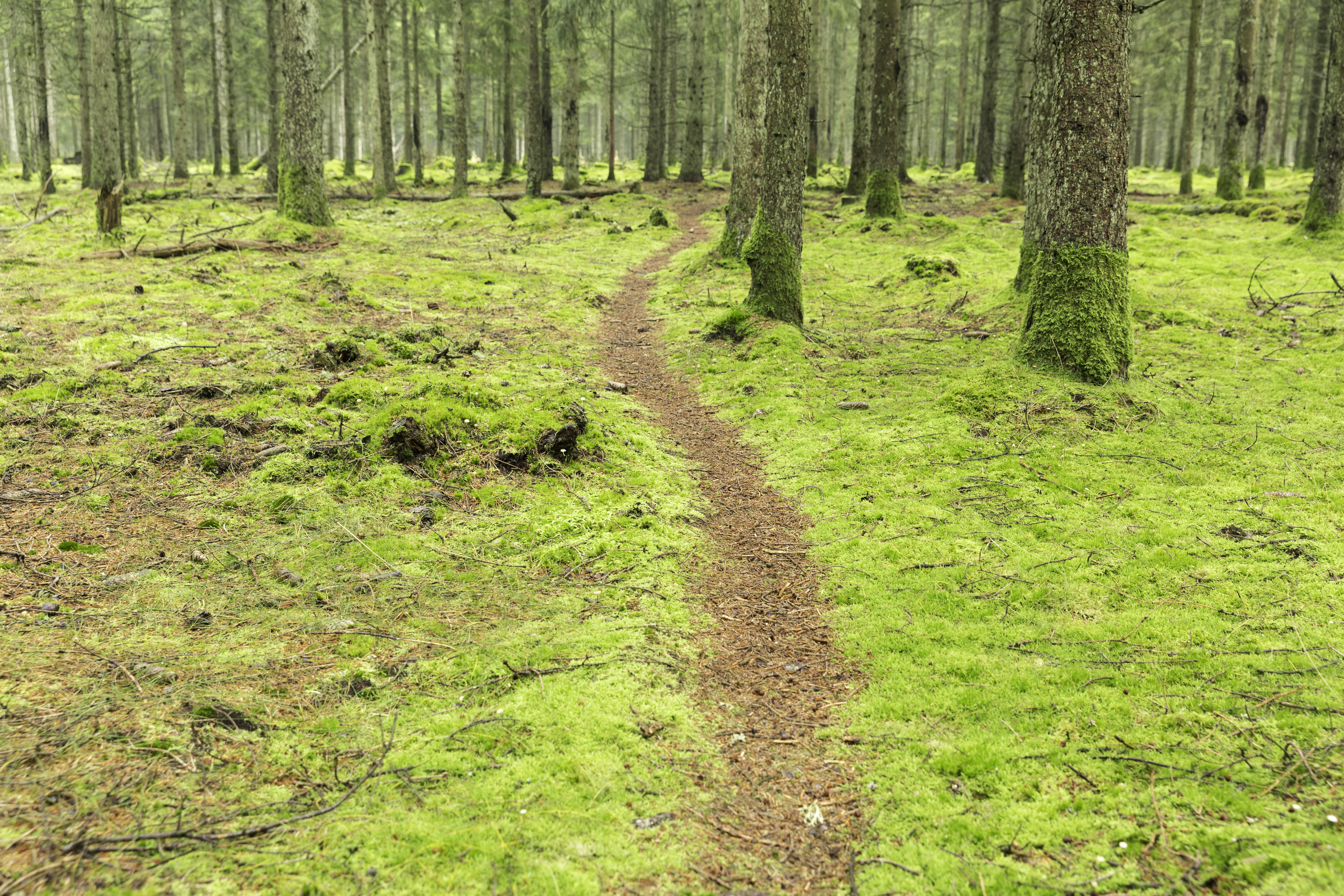 Dyreveksel skabt af krondyr i Kompedal Plantage